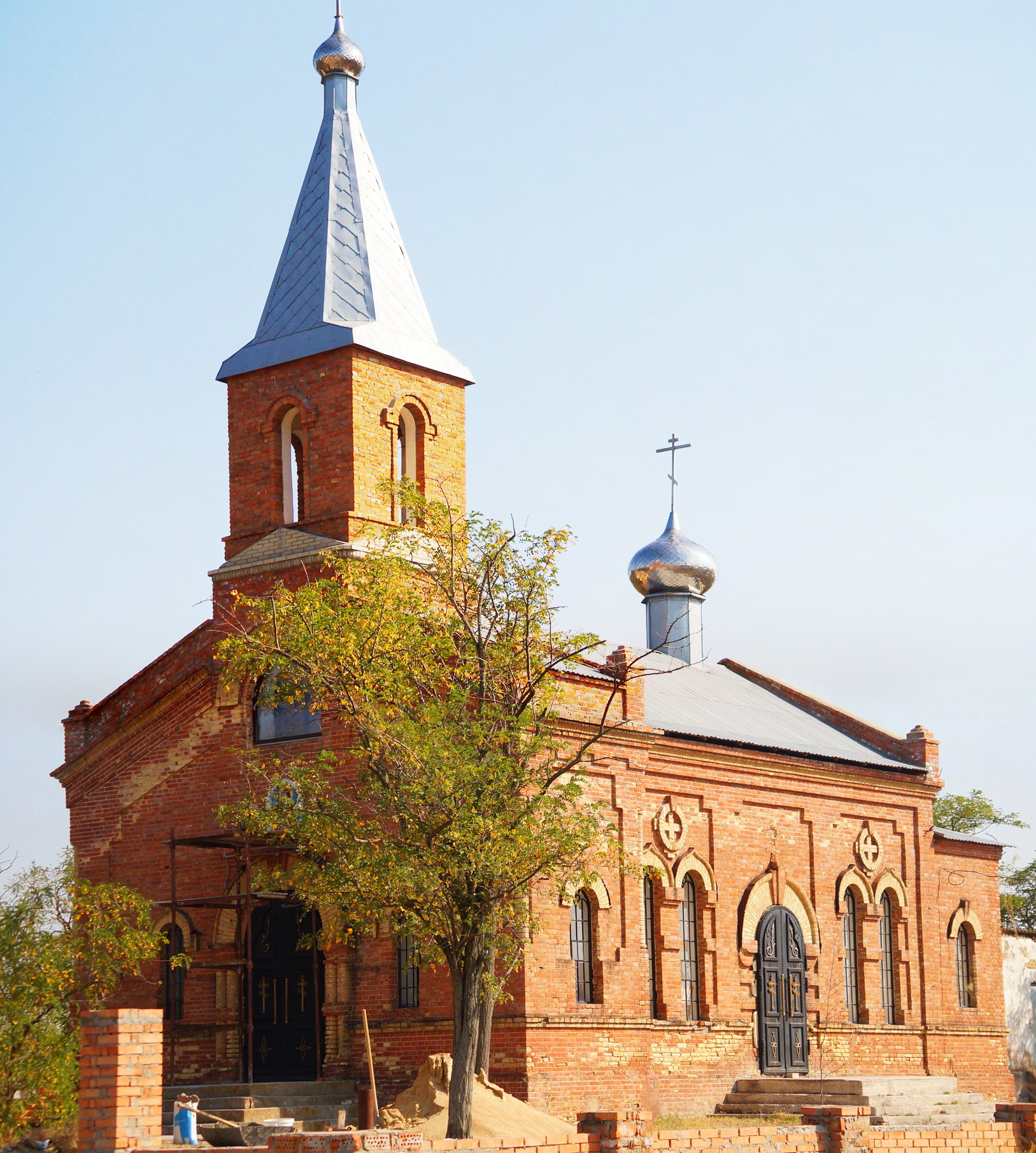 Церква, село Покровка